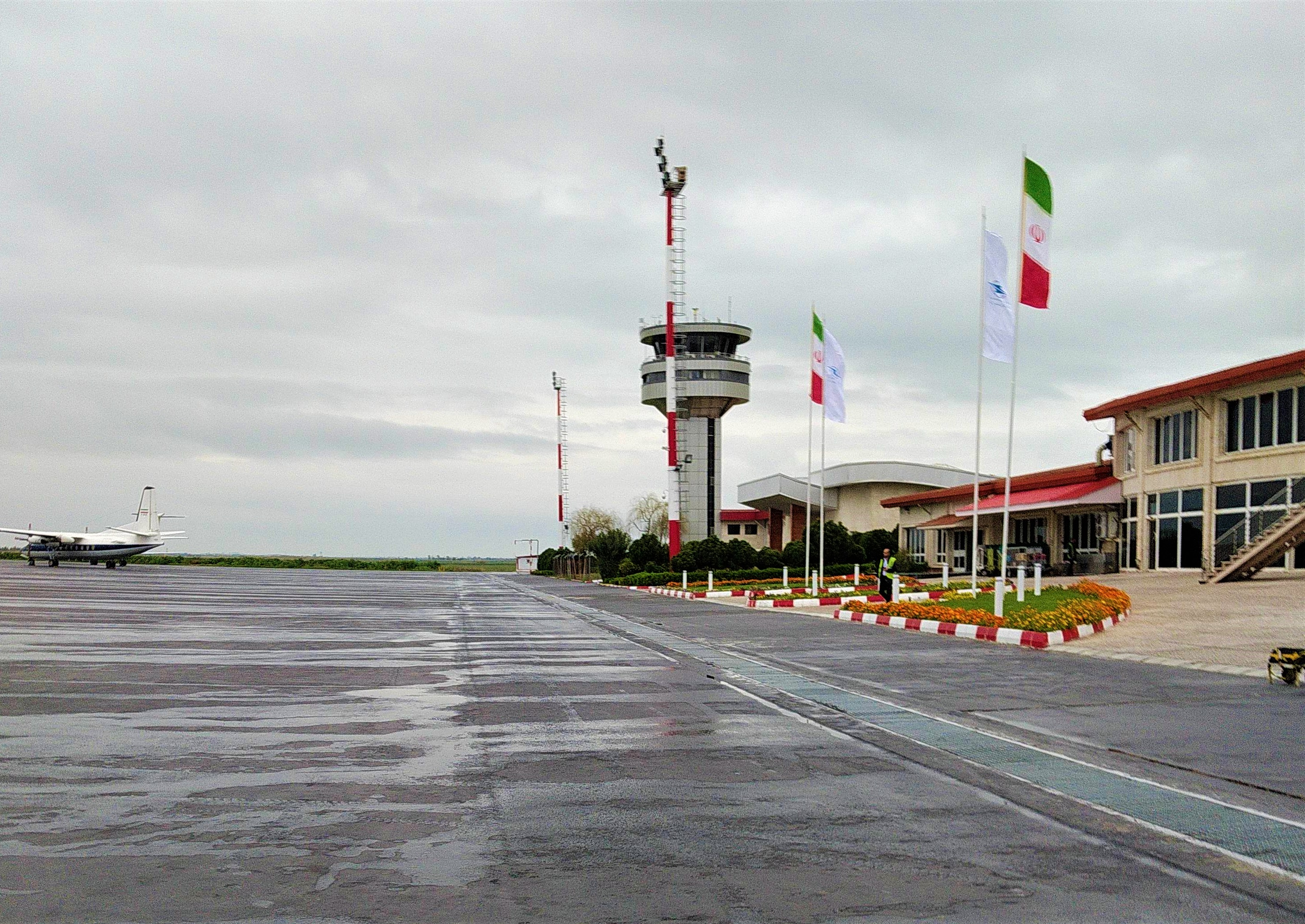 فرودگاه گرگان در هوای ابری